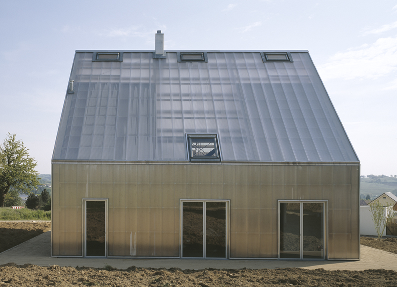 Patchworkhaus in Müllheim